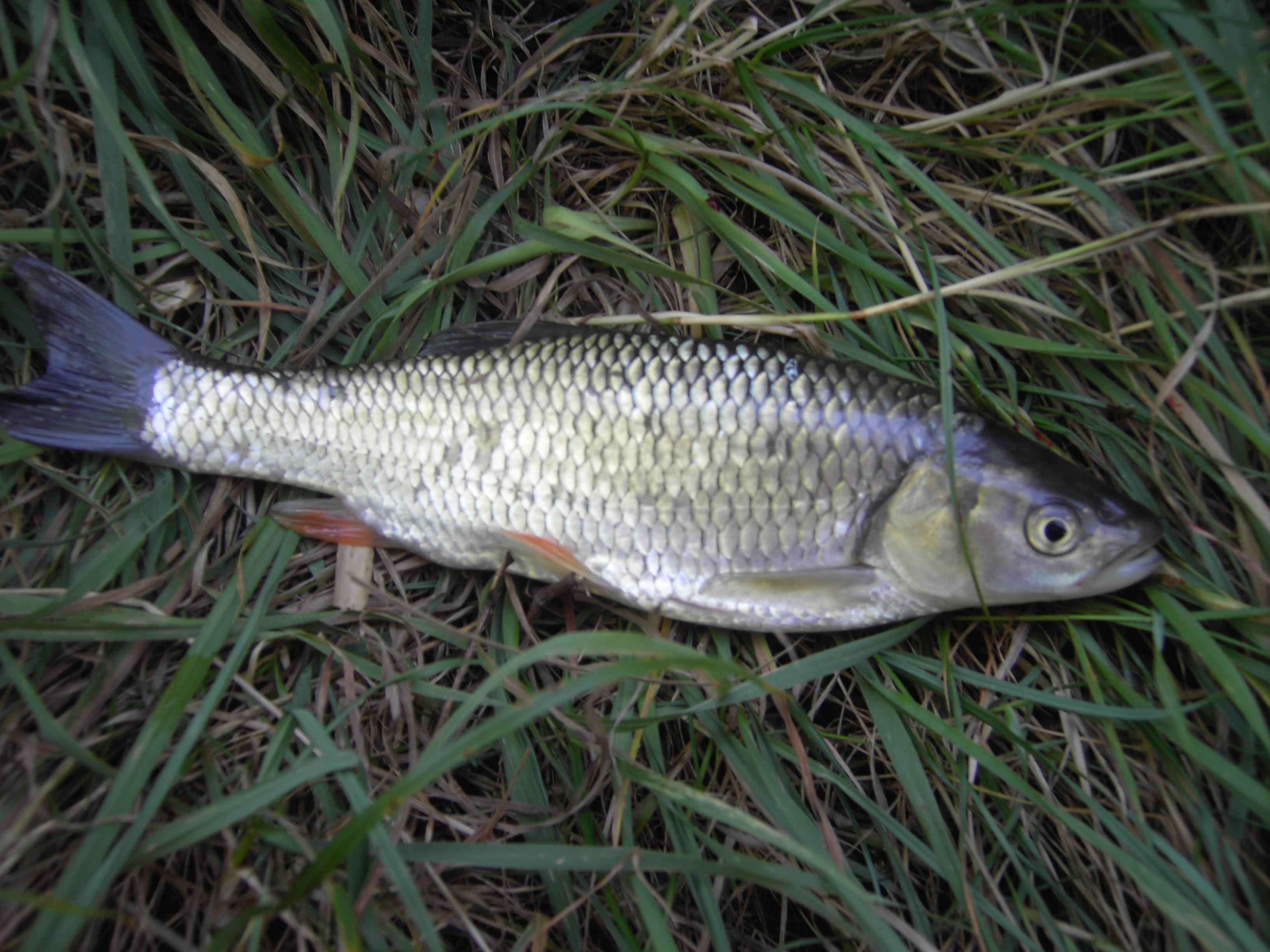 Leuciscus cephalus